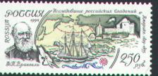 марка